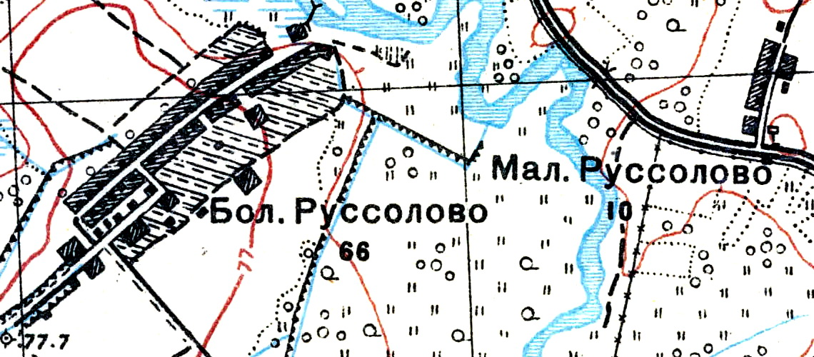 Топографическая карта Ленинградской области, квадрат О-36-13-А-б (Пос. Тайцы), деревня Руссолово